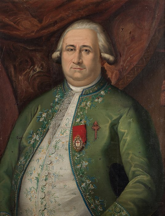 El Excmo. Sr. Don Pedro López de Lerena (1734-1792) fue Primer Ministro en el Real Consejo de Hacienda durante los reinados de Carlos III y Carlos IV.